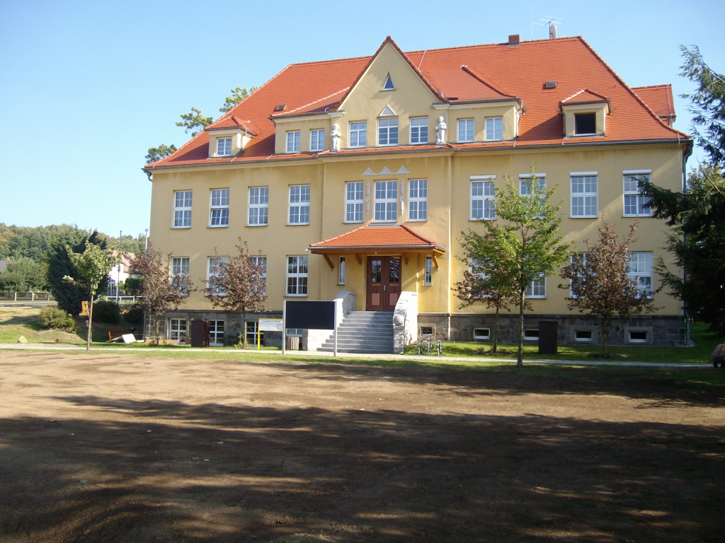 Ehemalige Schule und Dorfgemeinschaftszentrum in Schmölln/OL Hornjoserbsce: Něhdyša šula a centrum wjesneho zhromadźenstwa w Smělnje.